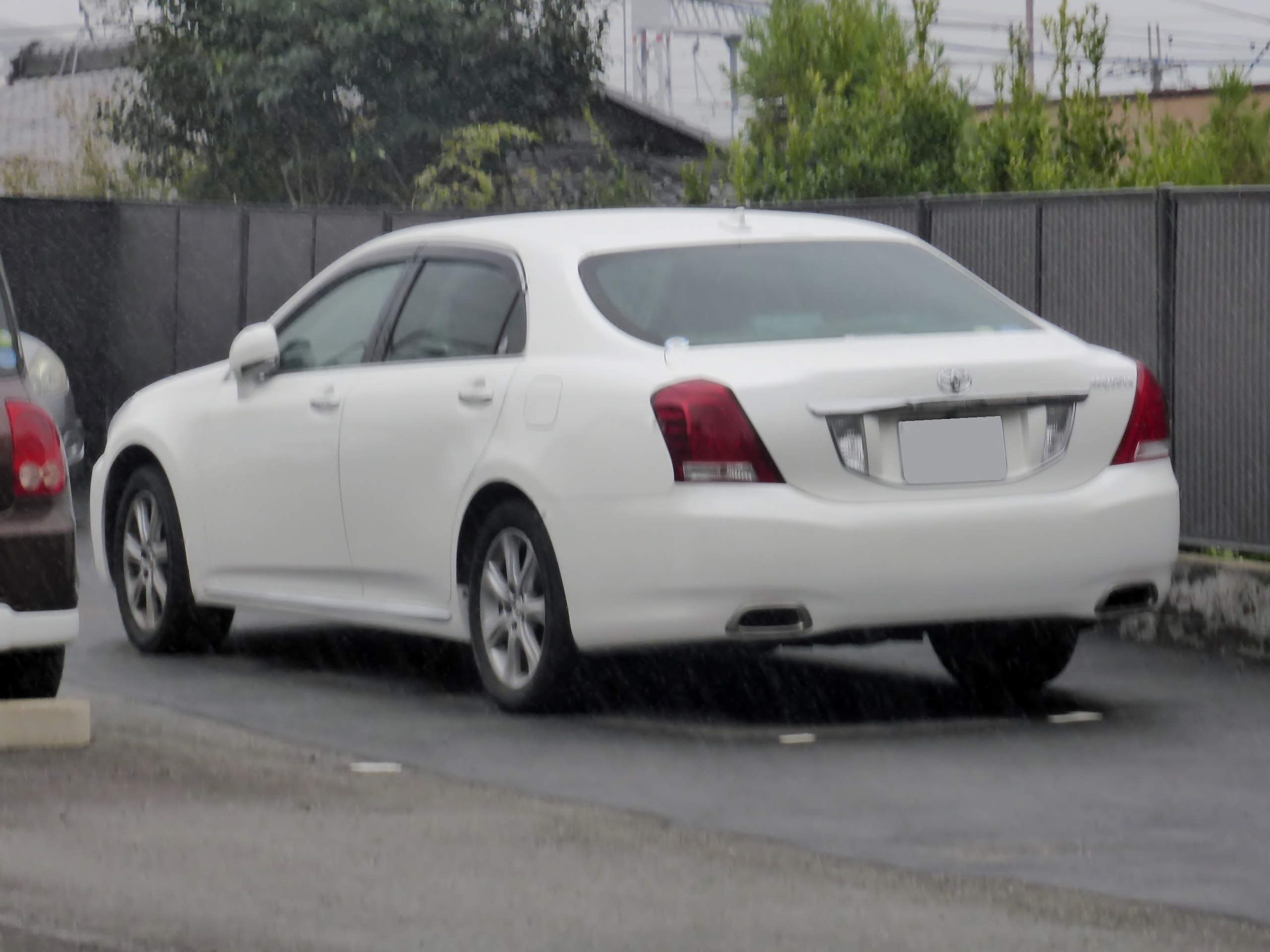 S200型トヨタ・クラウンマジェスタをリアから撮影。